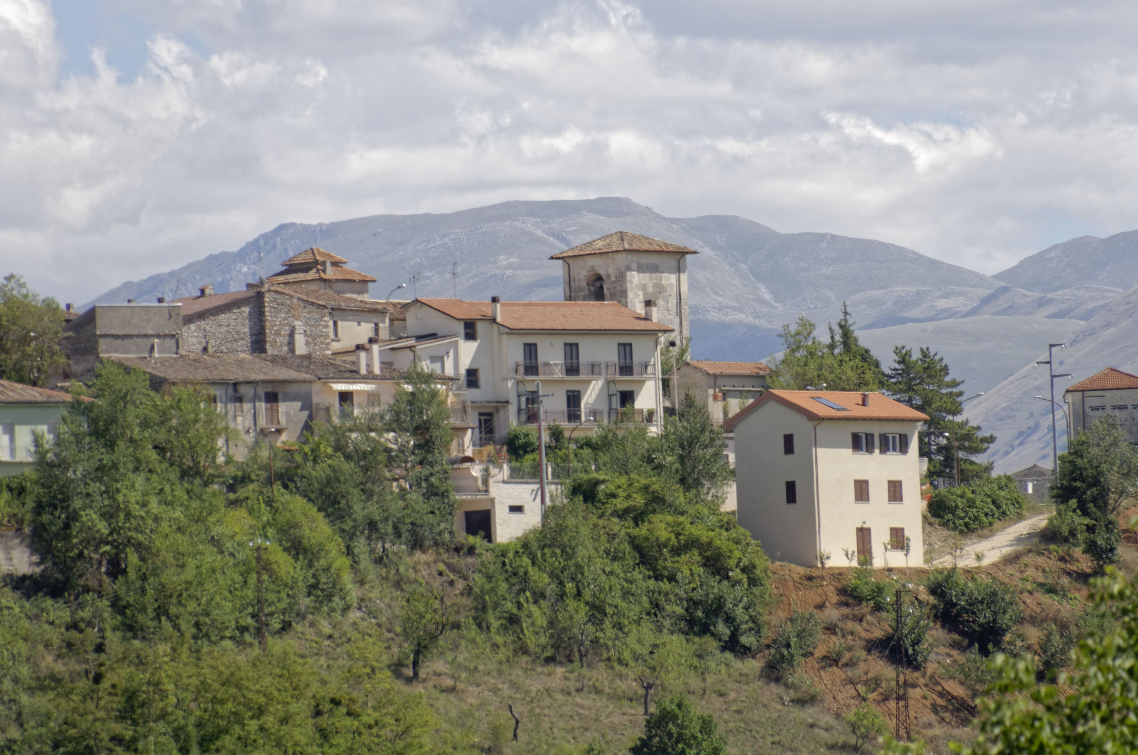 Amiternum 2015